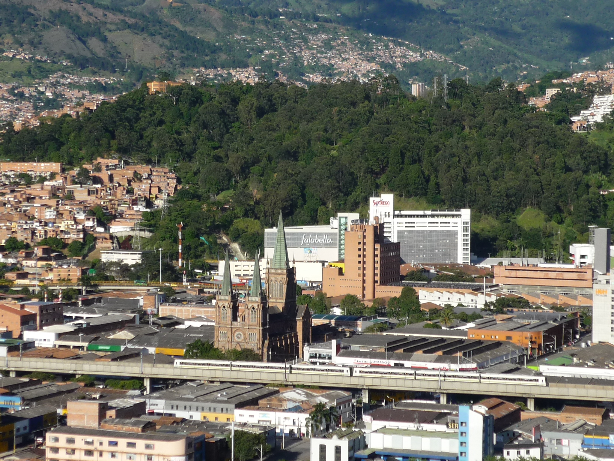 Panorámica del centro de Medellín donde se ve el viaducto del metro y la iglesia del Perpetuo Socorro, así como uno de los cerros tutelares de la ciudad: la Asomadera.